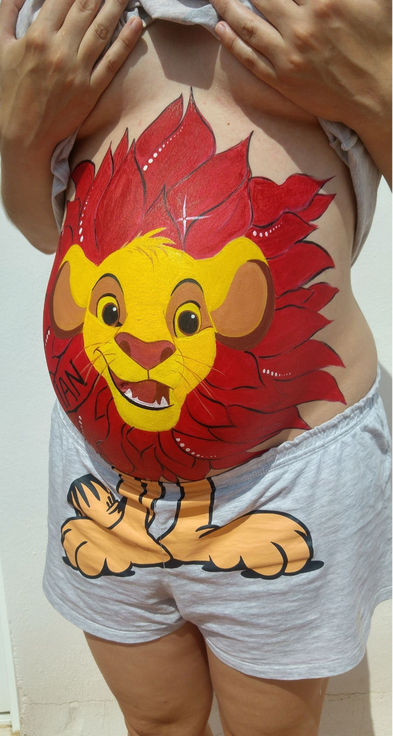 La pintura corporal que se utiliza para el bodypainting suelen ser pinturas al agua